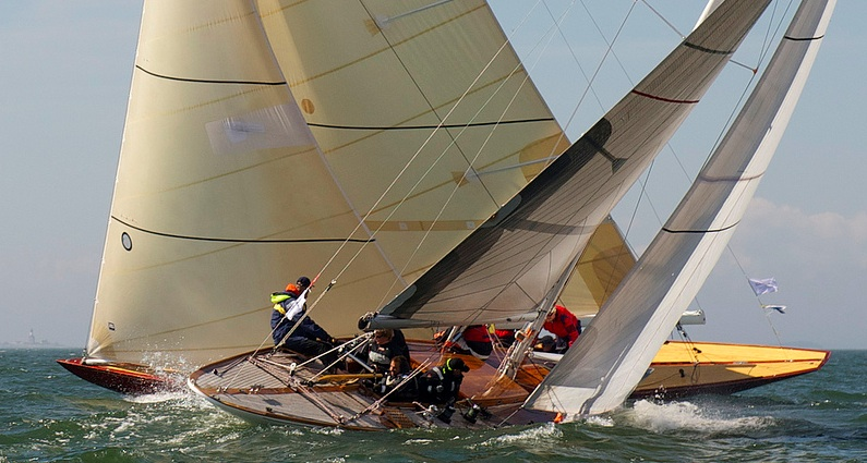 De finska åttorna Spinx (FIN 4) och Sagita (Fin-2) tävlar utanför HSS i Helsingfors 2012